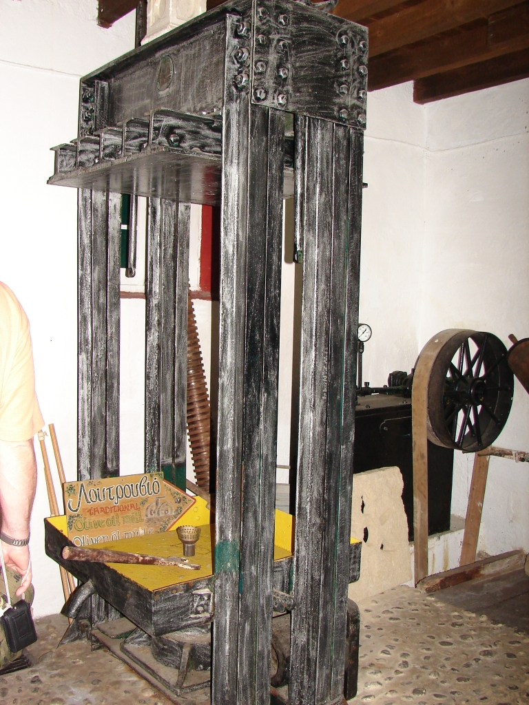 alte Olivenpresse